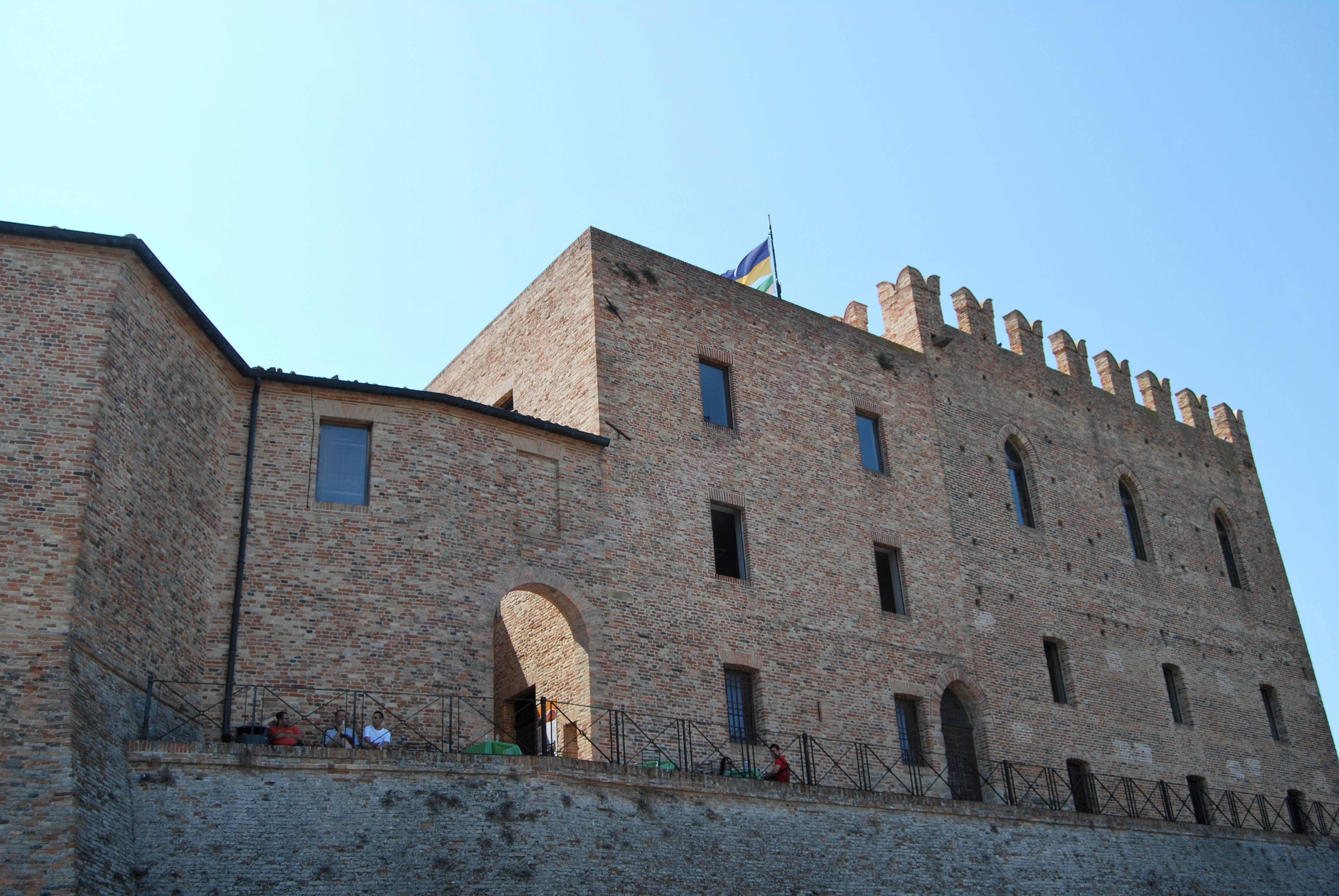 Rocca Malatestiana This is a photo of a monument which is part of cultural heritage of Italy.